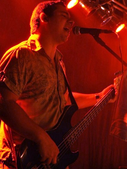 Deco Rodrigues, baixista do Trazendo a Arca. Foto de Roberta Chimango